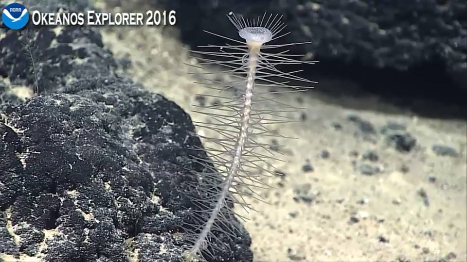 An unidentified stalked cladorhizid sponge seen in the abyss by NOAA Okeanos Explorer mission.